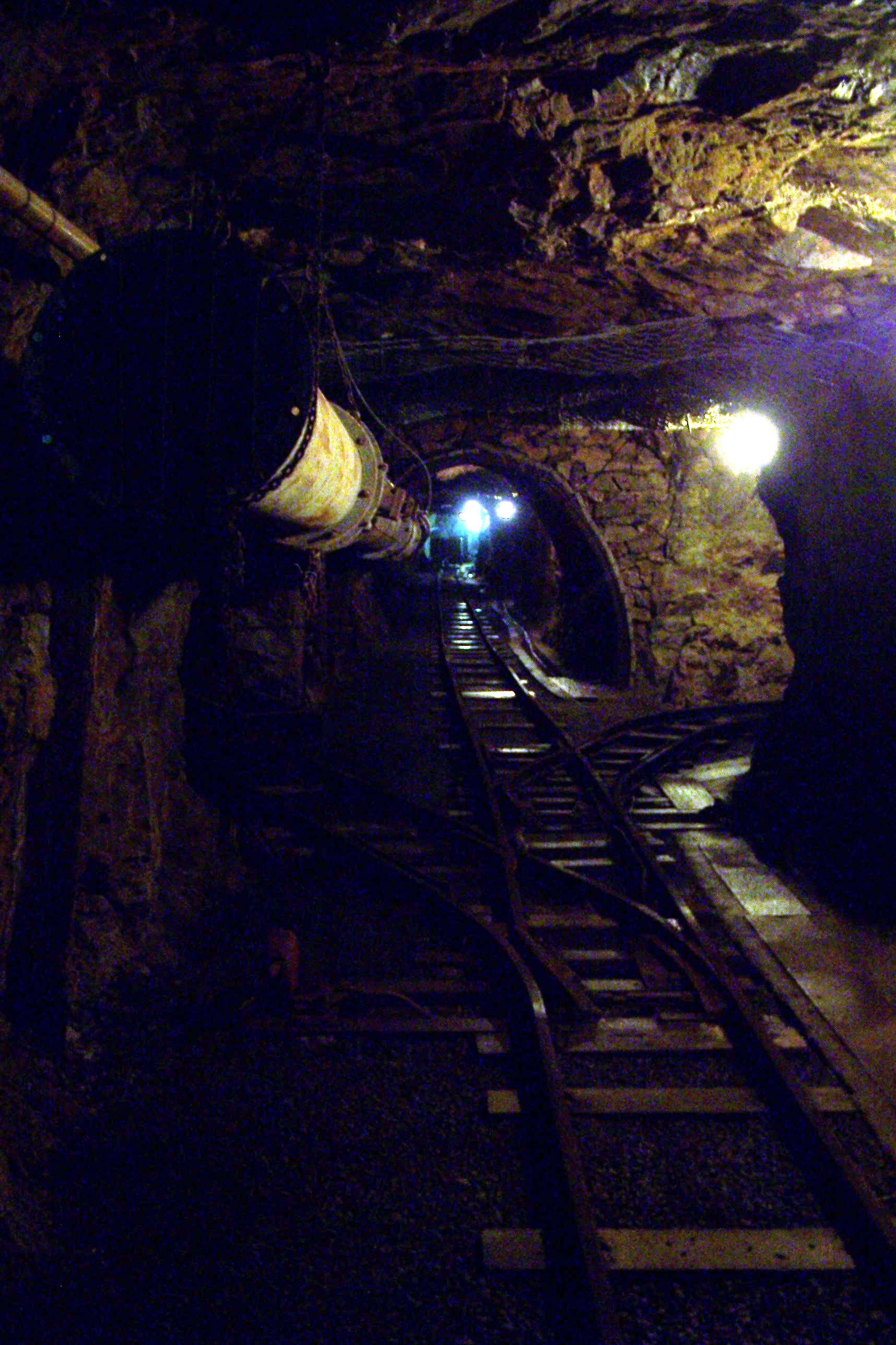 Hornický skanzen Štola č. 1.